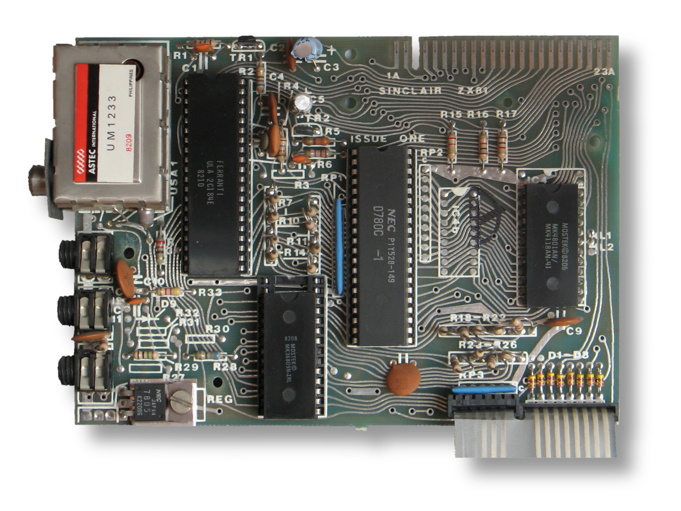 Leiterkarte des ZX81